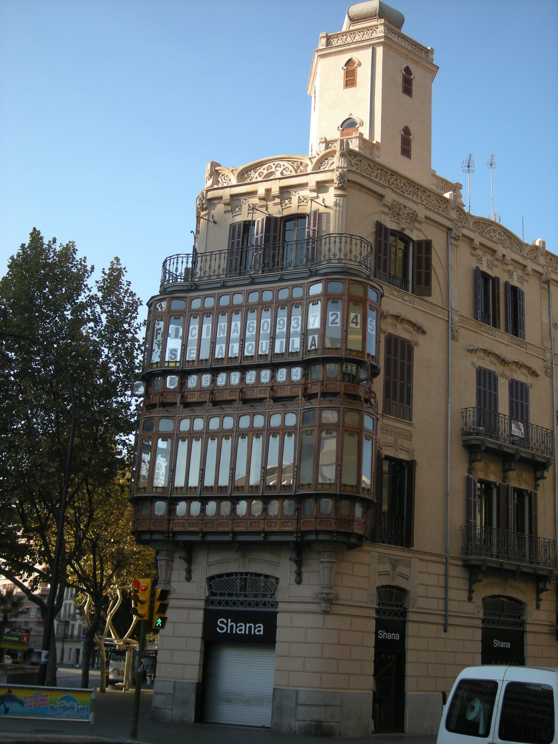 Bar Triquet. Palma. Mallorca.